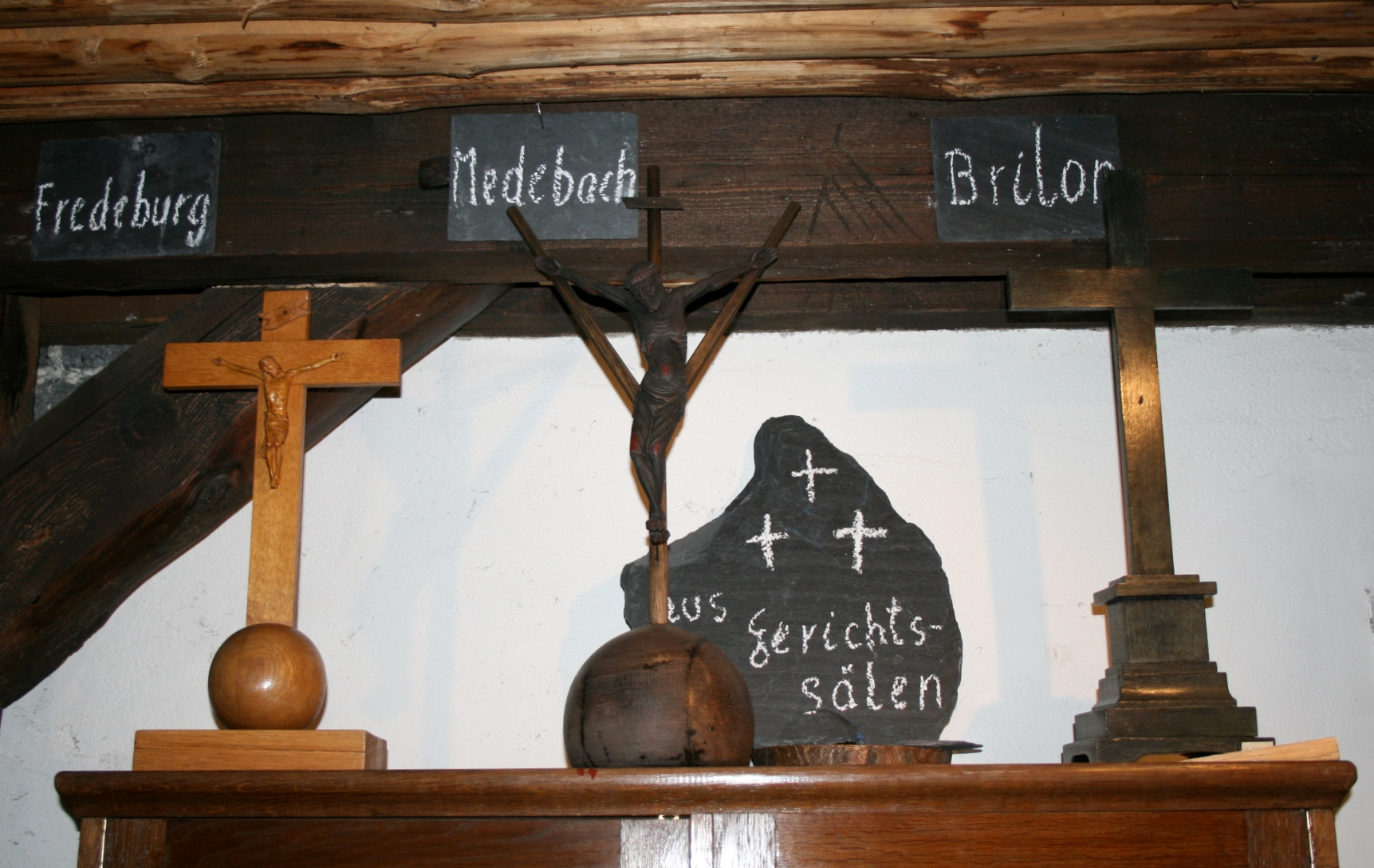 Verschiedene Schwurkreuze im Gerichtsmuseum Bad Fredeburg in Schmallenberg.